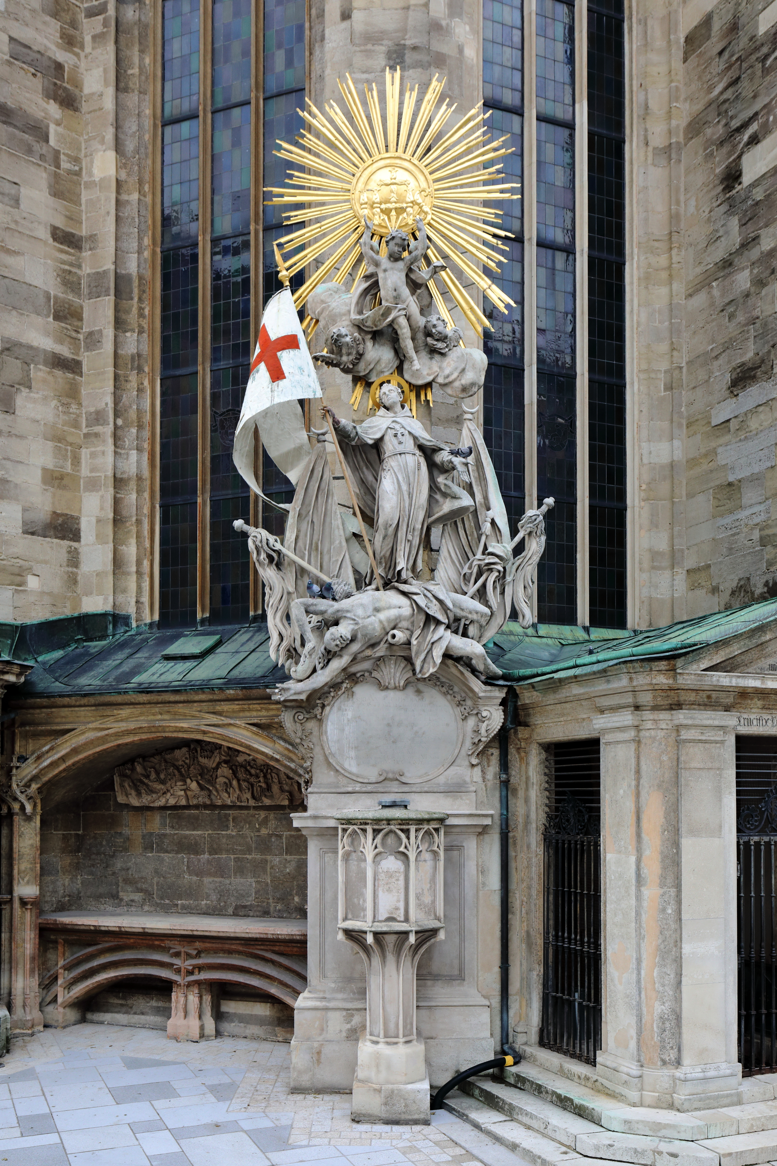 Die Capistrankanzel beim Stephansdom in der österreichischen Bundeshauptstadt Wien.Die Capistrankanzel ist ein Denkmal zu Ehren des heiligen Franziskanermönches Johannes Capistranus und befindet sich nordseitig an der Außenmauer des Albertinischen Chores. Es besteht aus einer Kanzel und einer Monumentalgruppe. Von der Kanzel predigte Capistran und sie stand ab etwa 1430 vermutlich inmitten des Stephansfriedhofes. Ursprünglich war sie ein Schnitzwerk aus Eichenholz. Später in Stein nachgebildet, wurde sie mit Auflassung des Friedhofs um 1735 dicht an den Dom versetzt und 1737/38 zu einem Teil eines Denkmals umgeformt, indem sie um eine figurale Gruppe erweitert wurde. Diese wurde von dem Bildhauer Johann Joseph Resler nach einem Entwurf des Malers François Roettiers errichtet.